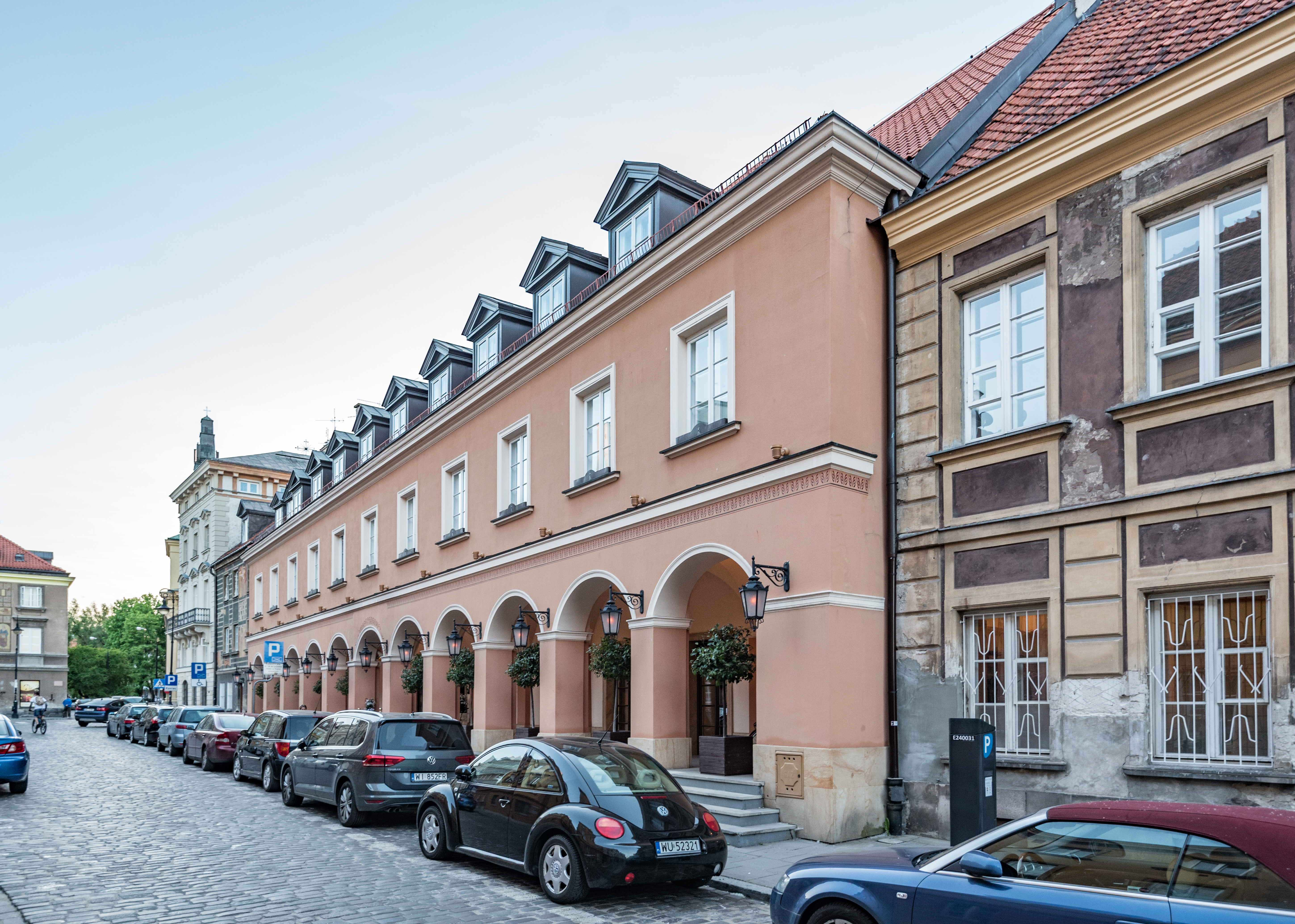 Warszawa, ul. Kościelna 12